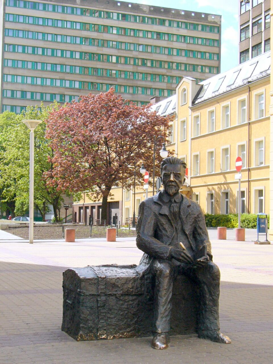 Kuferek Reymonta w Łodzi przy ul. Piotrkowskiej